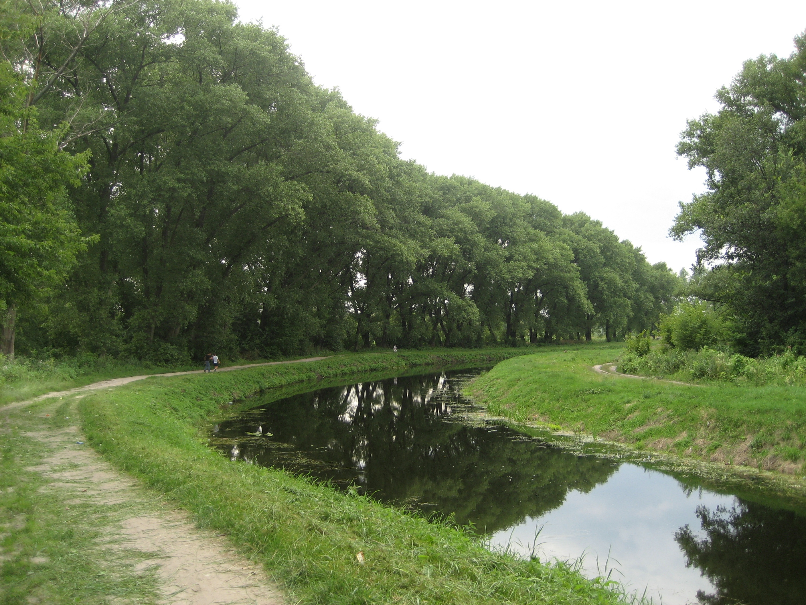 Река Остёр в Нежине.